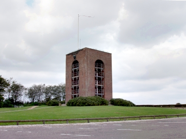 Tower Ejer Bavnehøj - near Skanderborg, Jutland, Denmark